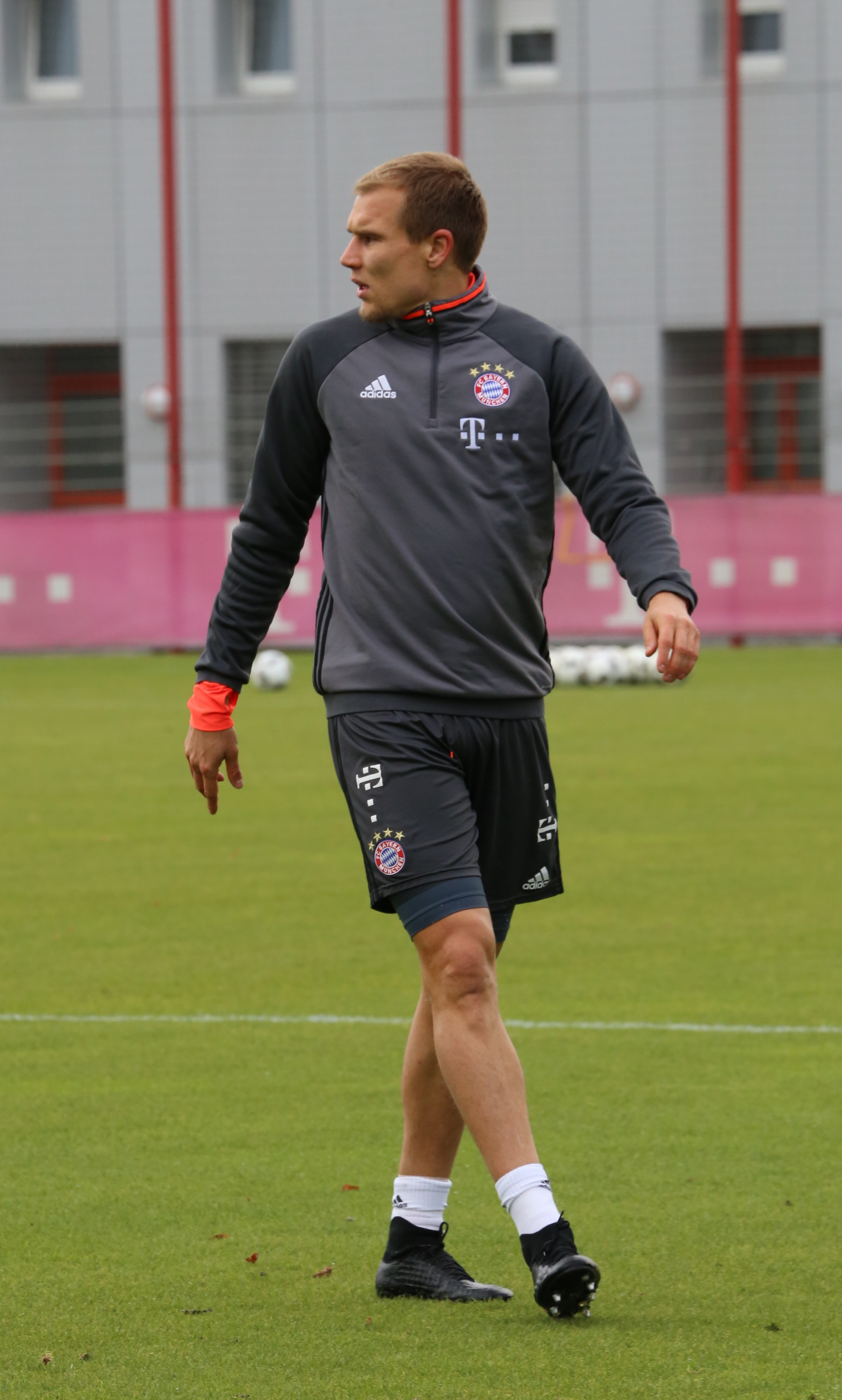 Holger Badstuber beim Training auf dem Gelände des FC Bayern München (November 2016)